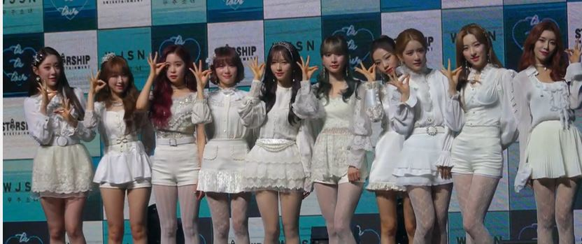 0108 오후 서울 광진구 광장동 예스24라이브홀에서 그룹 우주소녀(WJSN) 새 미니앨범 ‘WJ STAY(우주스테이)?’ 발매기념 쇼케이스가 열려 우주소녀가 포토타임에 포즈를 취하고 있다.